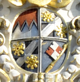 Würzburg, Neumünster, Fassade, Wappen des Bischofs Johann Philipp von Greiffenclau-Vollraths